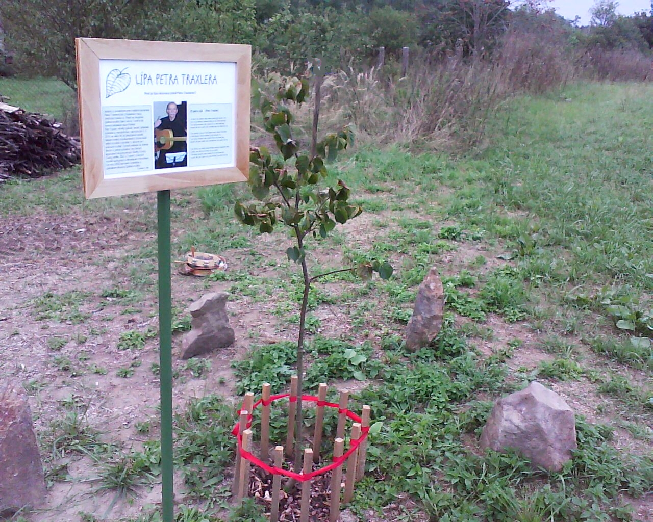 Lípa Petra Traxlera s informační tabulkou, která připomíná jeho odkaz.